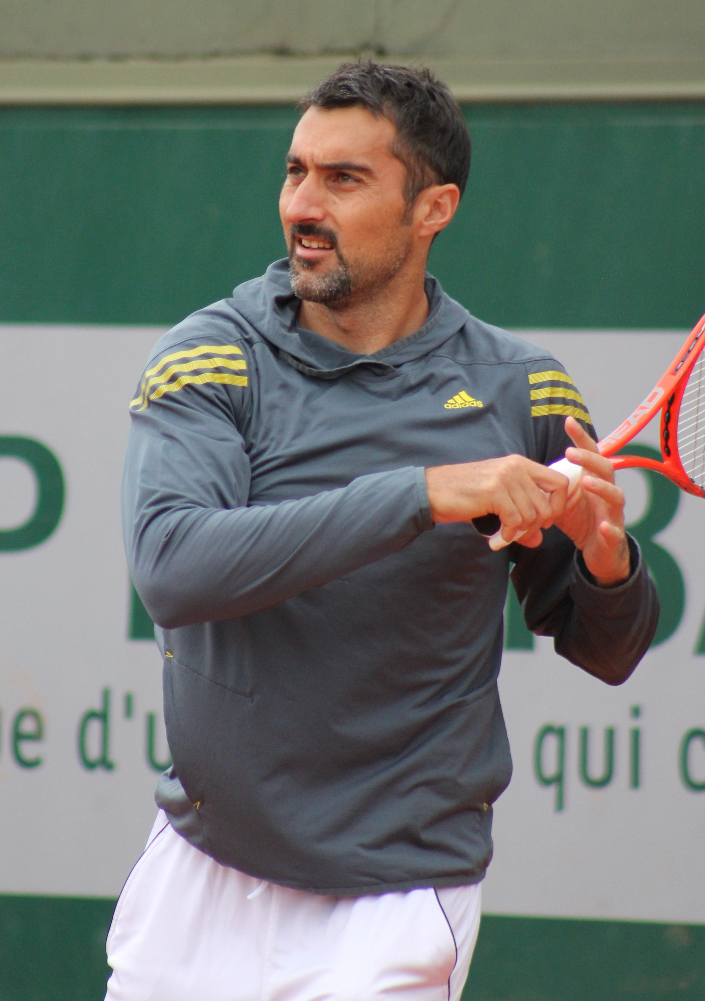 Zimonjic RG13 (6)